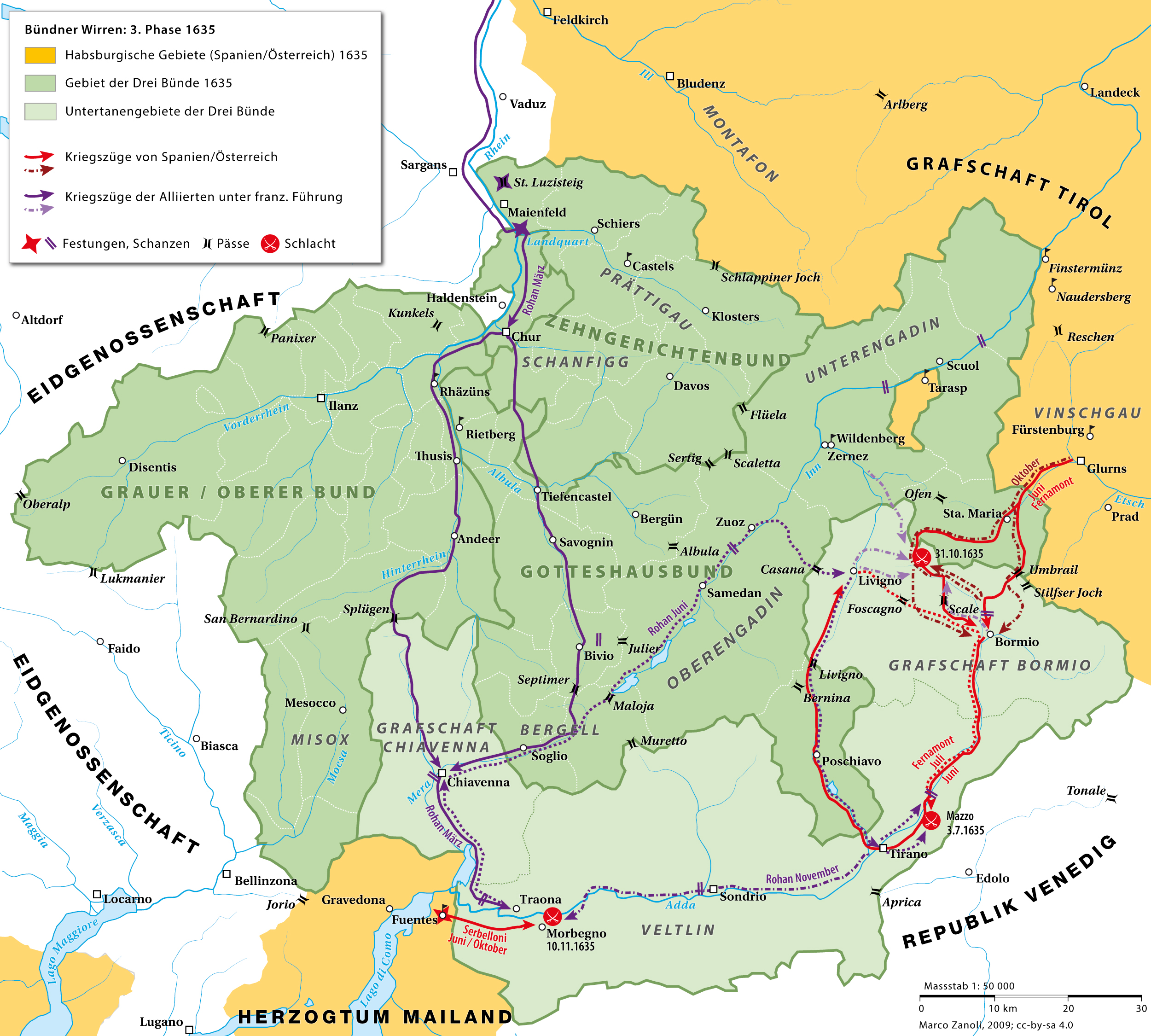 Die dritte Phase der Bündner Wirren 1635: Der Gebirgskrieg des Herzogs Rohan